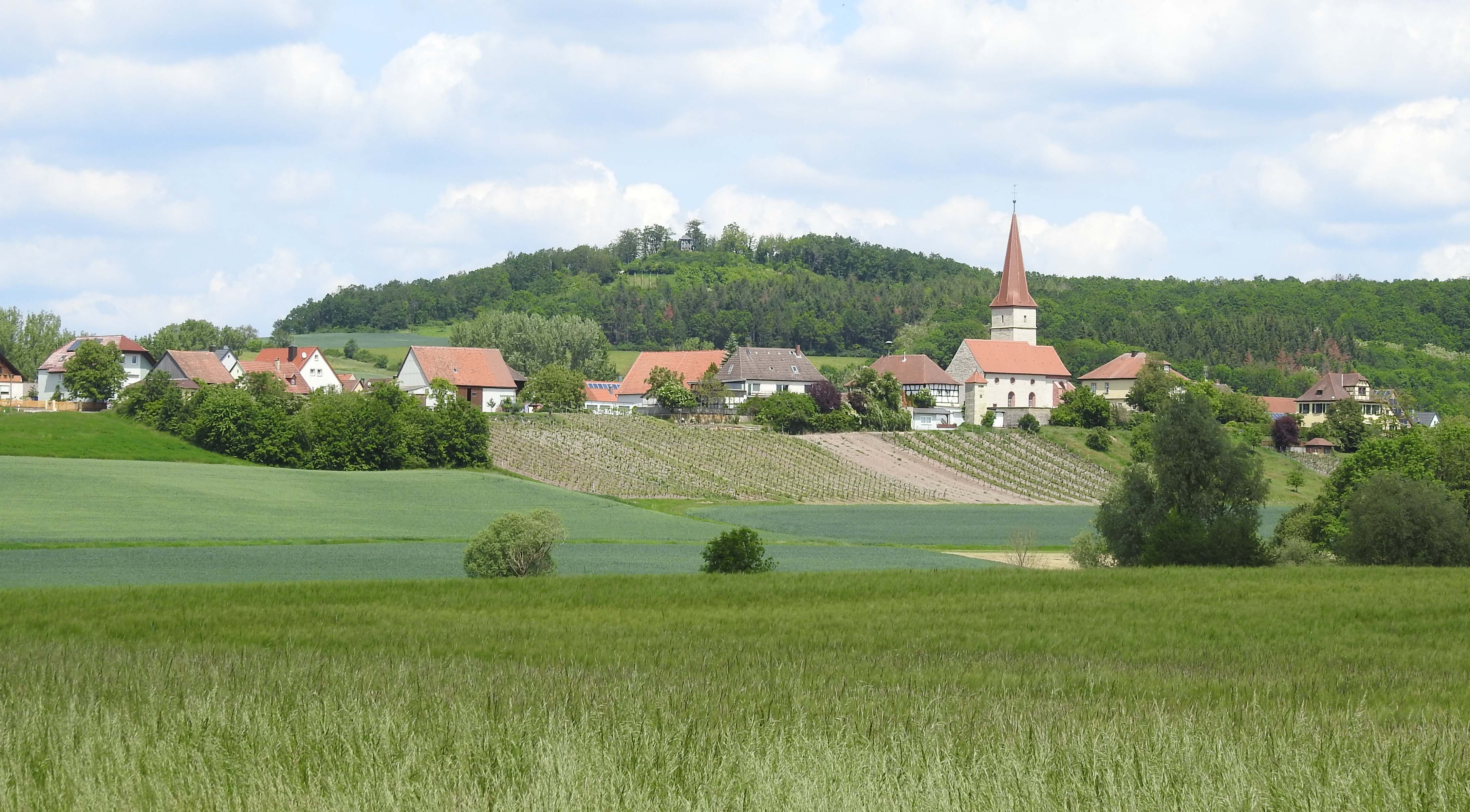 Rüdisbronn, Bad Windsheim, von Süden